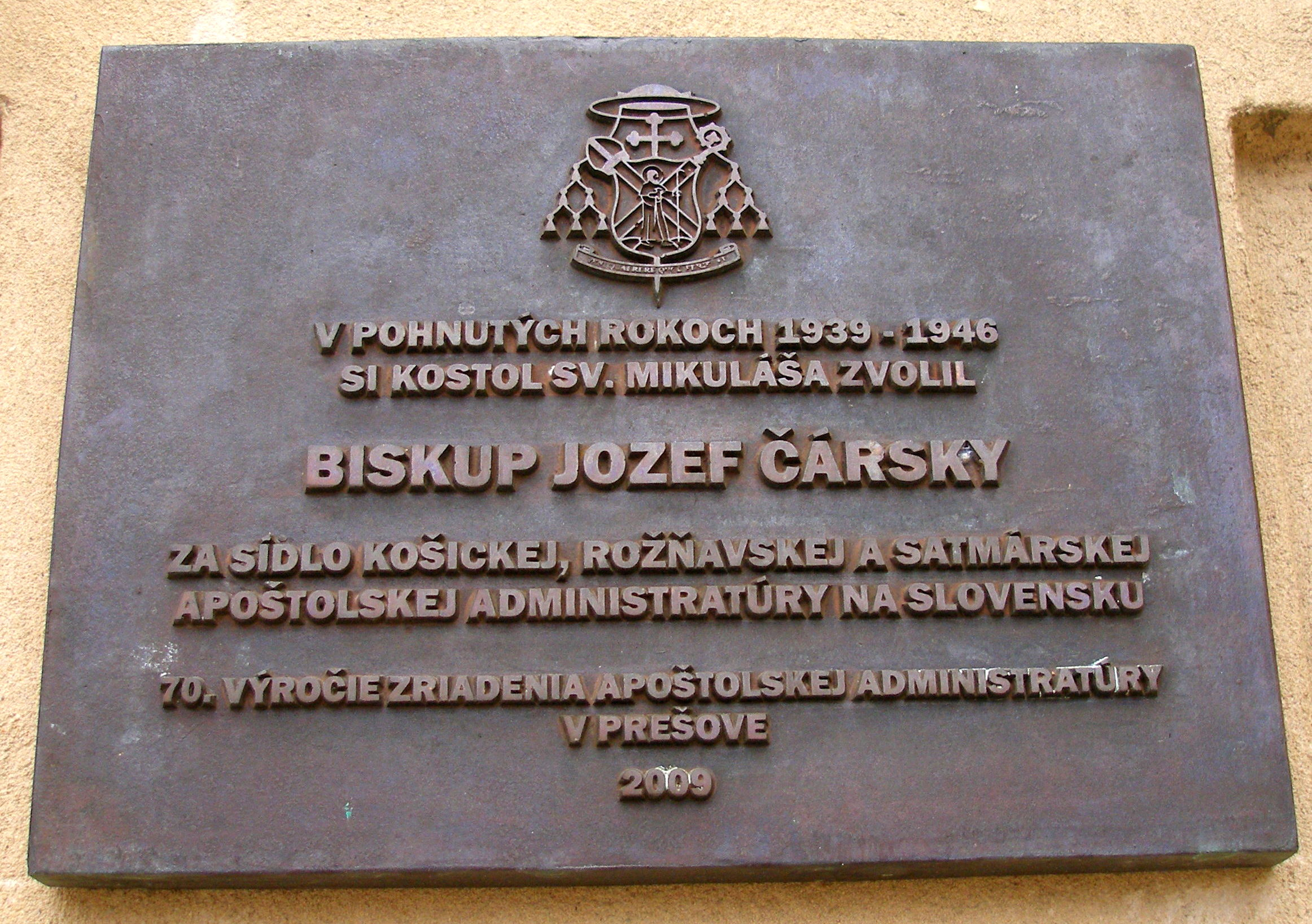 Pamätná tabuľa. Hlavná ulica mesto Prešov.